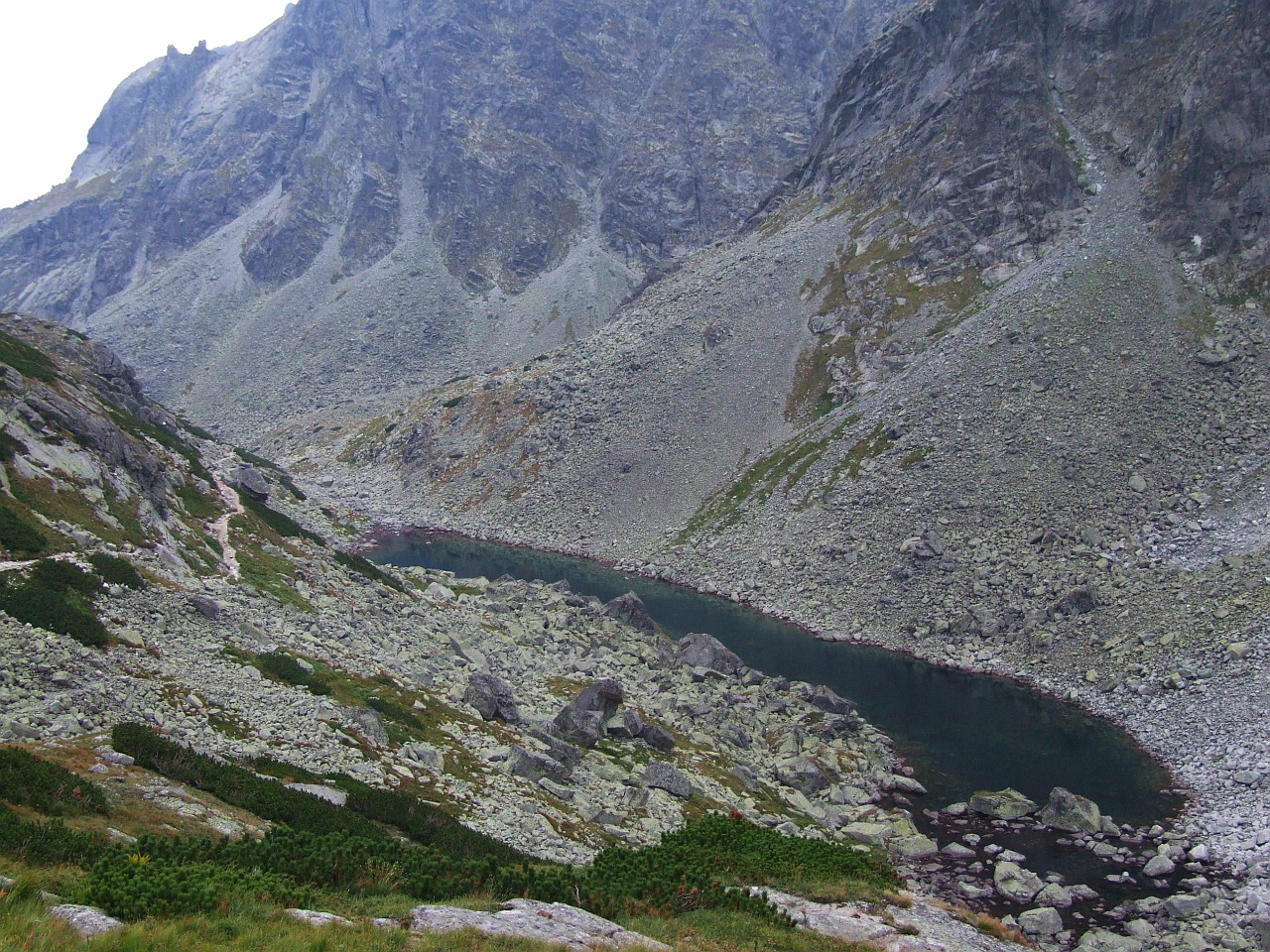 Długi Staw w Dolinie Staroleśnej (słowackie Tatry Wysokie)